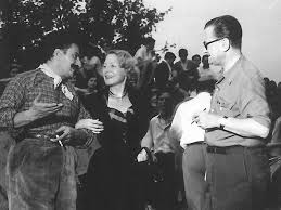 Lo scrittore Giovannino Guareschi con il regista Julien Duvivier durante le riprese del film "Don Camillo" Licensing 1952